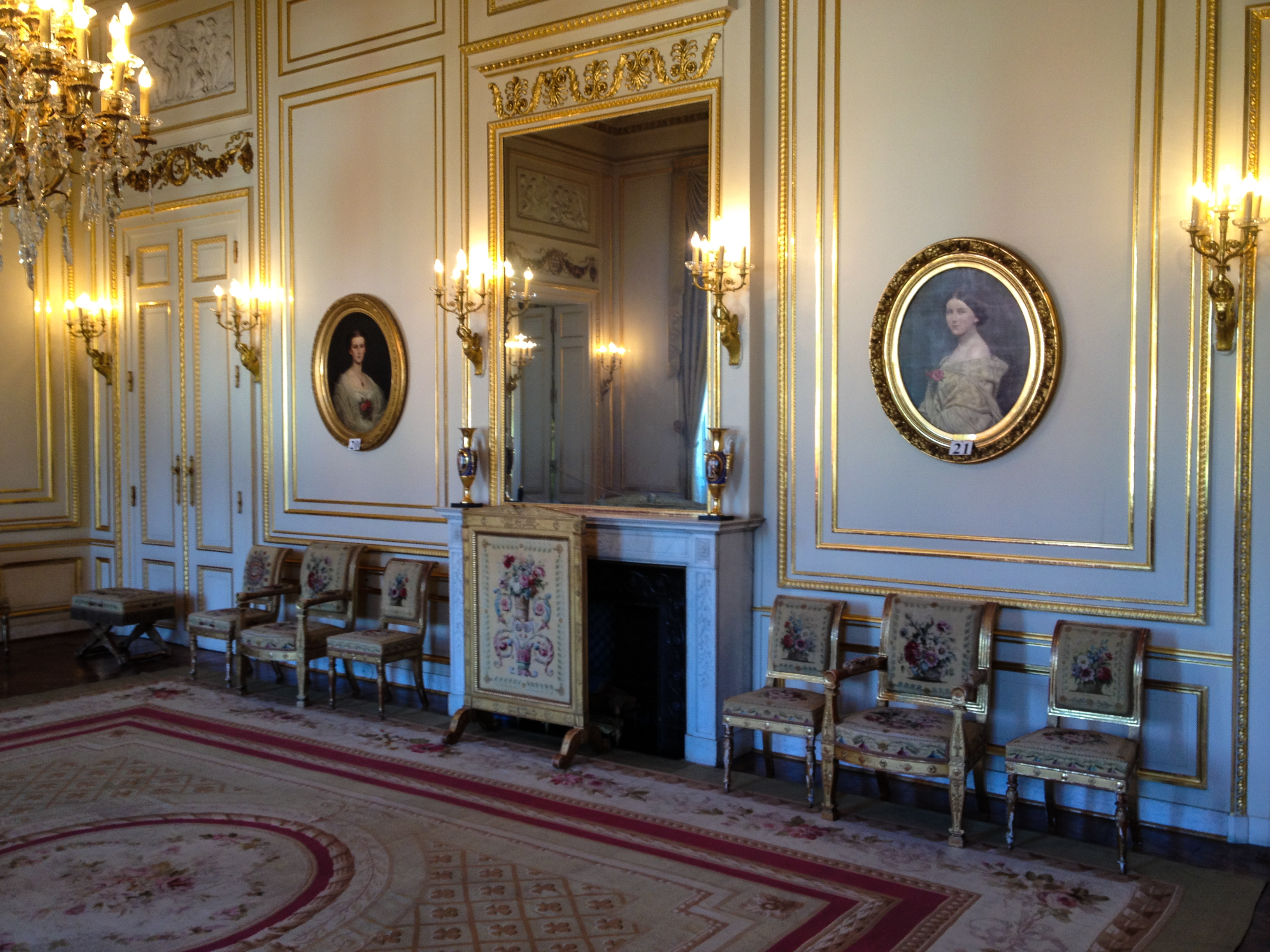 The Royal Palace of Brussels (Dutch: Koninklijk Paleis van Brussel